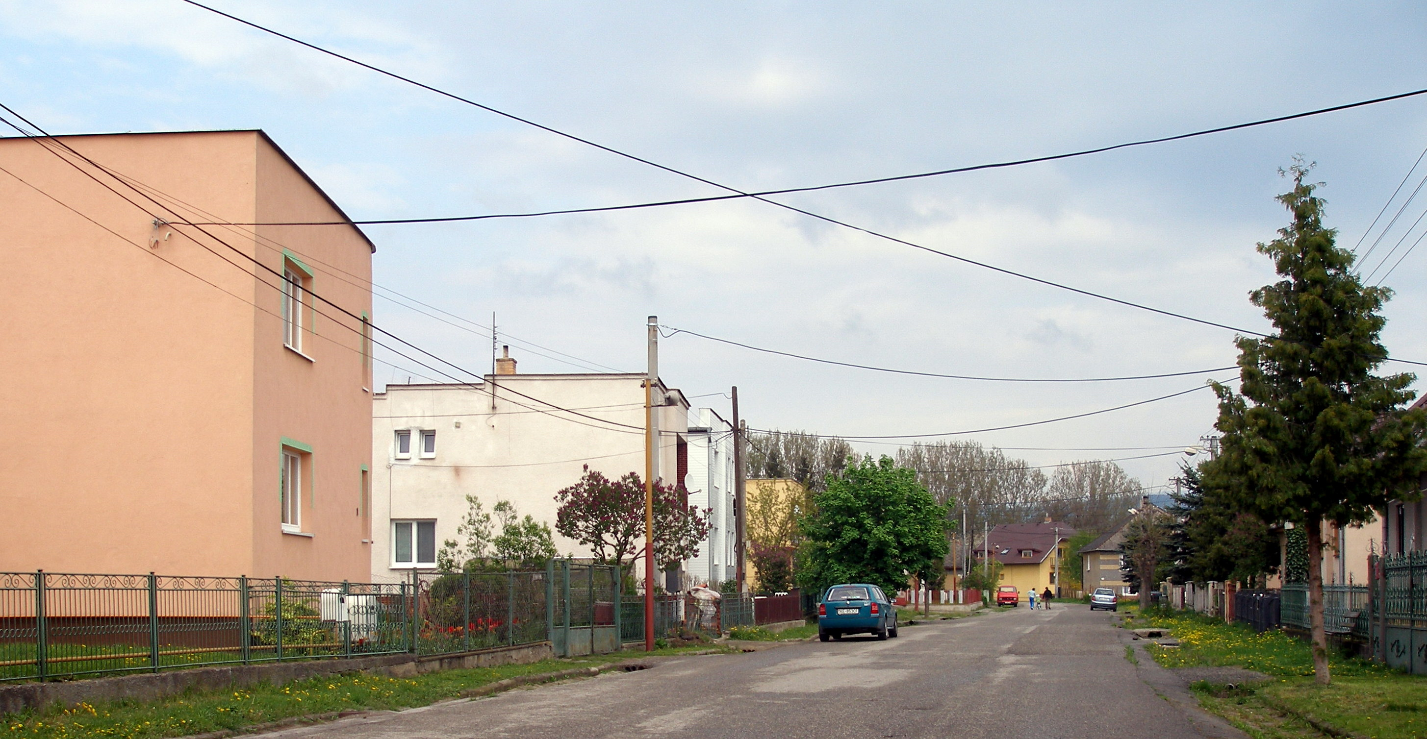 Obec Seniakovce okres Prešov región Šariš